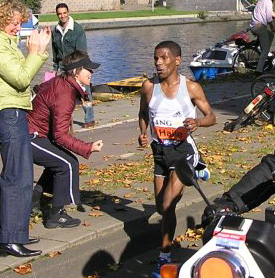 Haile Gebrselassie, Amsterdam 2005. Cropped from Image:Haile amsterdam2005.jpg